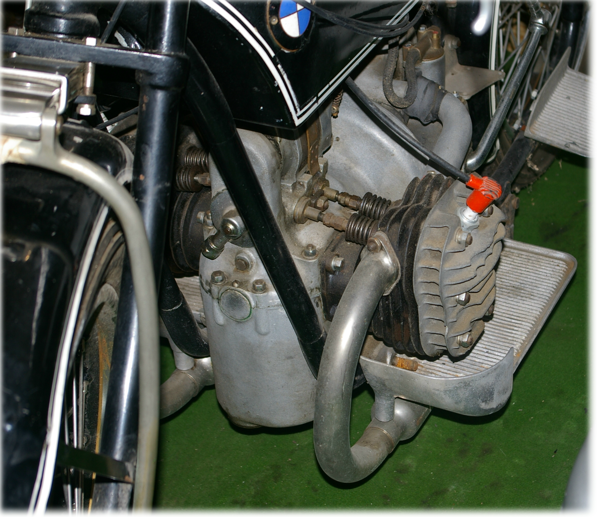 Motor der BMW R 42 Bj.1926, Seitenventiler.